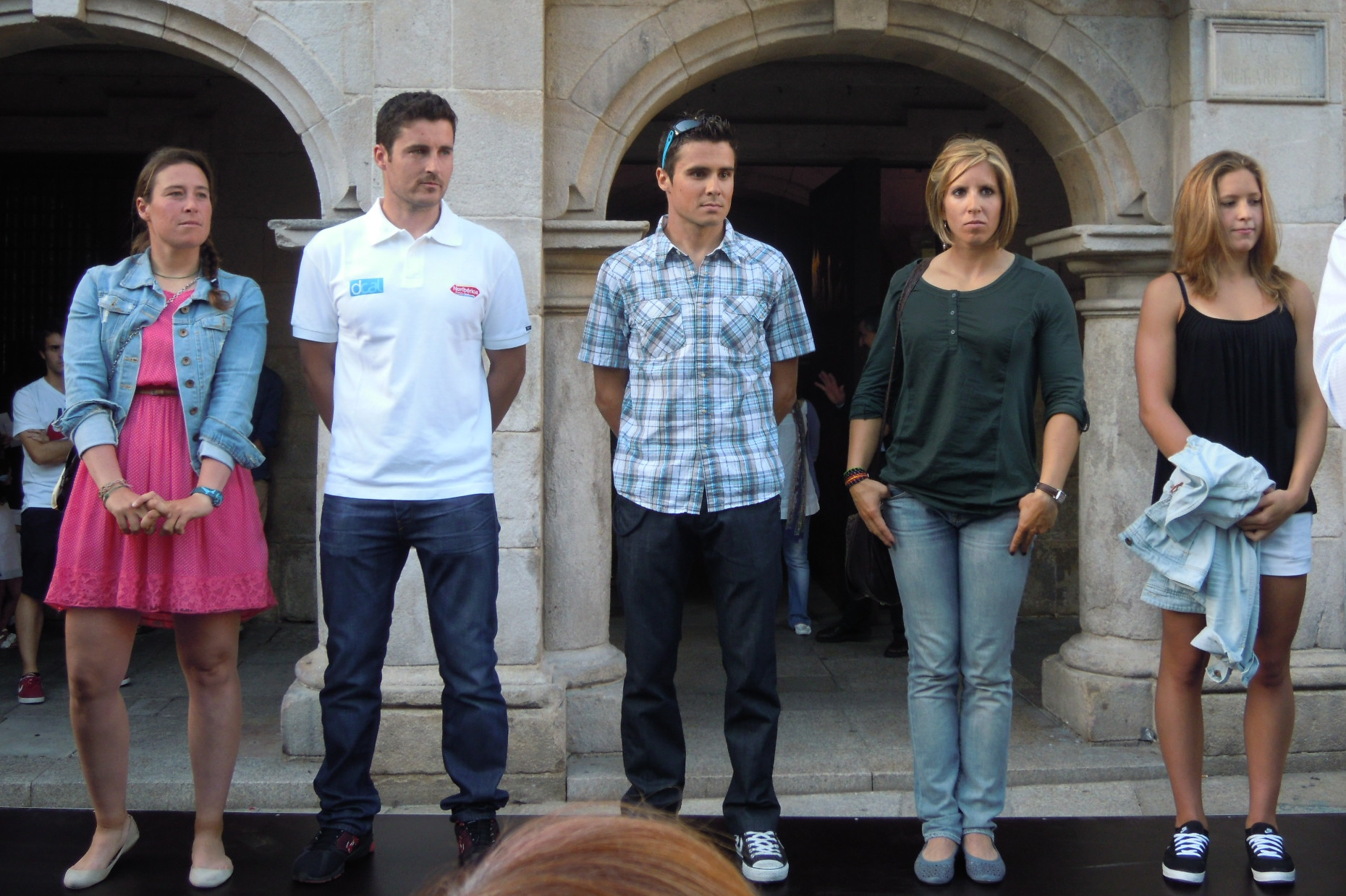 Tamara Echegoyen, David Cal, Javier Gómez Noya, Teresa Portela e Beatriz Gómez, cinco dos Galegos nos Xogos Olímpicos de 2012 vinculados á vila de Pontevedra, na benvida organizada polo concello.